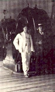 La Estación El Encantado fue la primera central hidroeléctrica que suministro energía eléctrica a la ciudad de Caracas inicio sus actividades el 8 de agosto de 1897 su administración estuvo a cargo de la Compañía Anónima Electricidad de Caracas fundada dos años antes en 1895 por el ingeniero Ricardo Zuloaga y estaba localizada al este de El Hatillo, estado Miranda – Venezuela al pie del Peñón de las Guacas y en la zona conocida como el cañón del río Guaire. Esta planta fue la primera de su tipo en latinoamérica y la segunda del continente